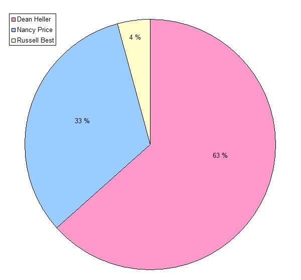 Résultats des élections 2010 à la Chambre des représentants des Etats-Unis, dans le 2ème district du Nevada.